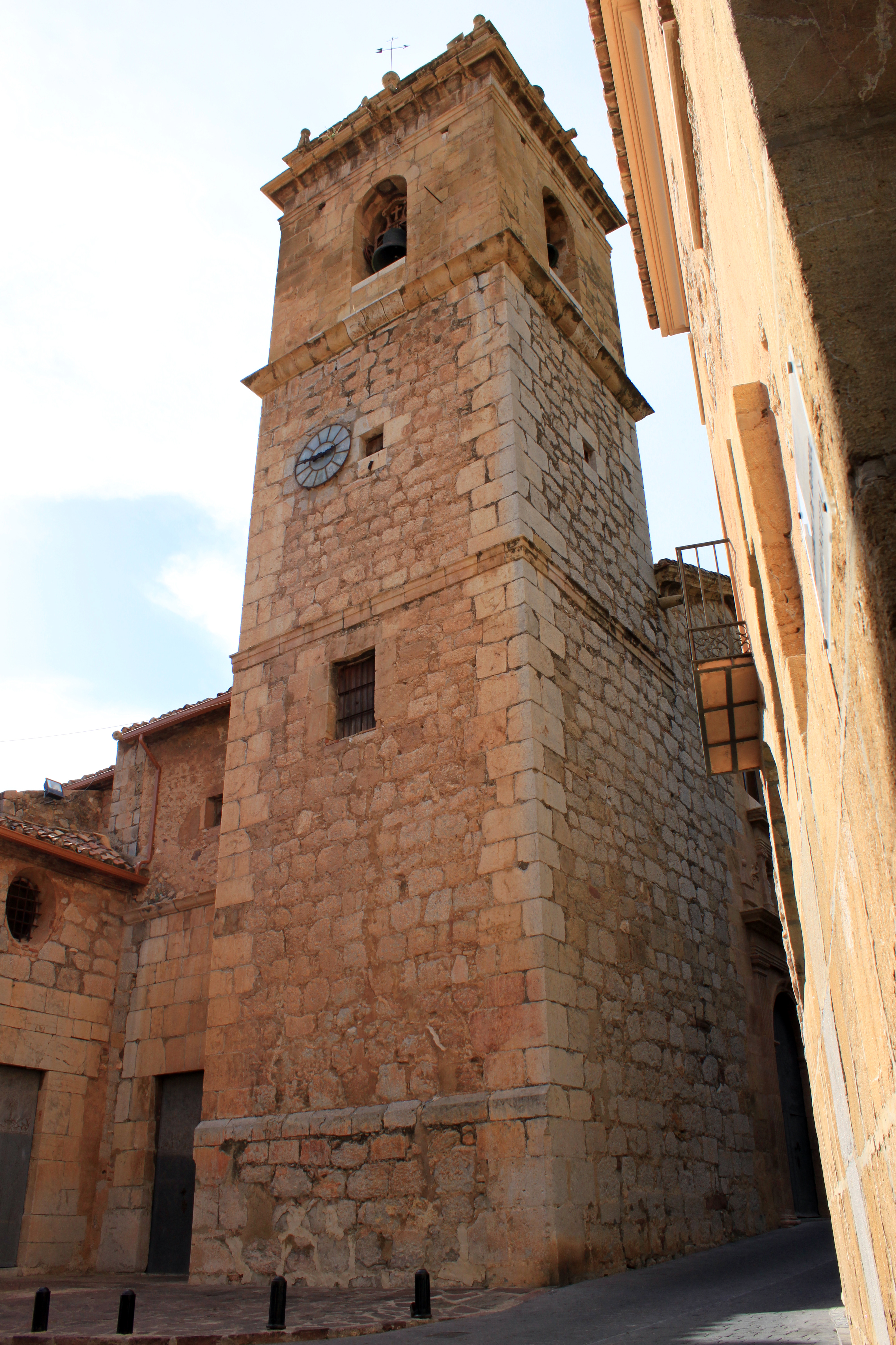 Iglesia Parroquial de San Bartolomé Apostol (s.XVI) situada en la Calle Palacio de la localidad de Borriol, provincia de Castellón, Comunidad Valenciana, España.